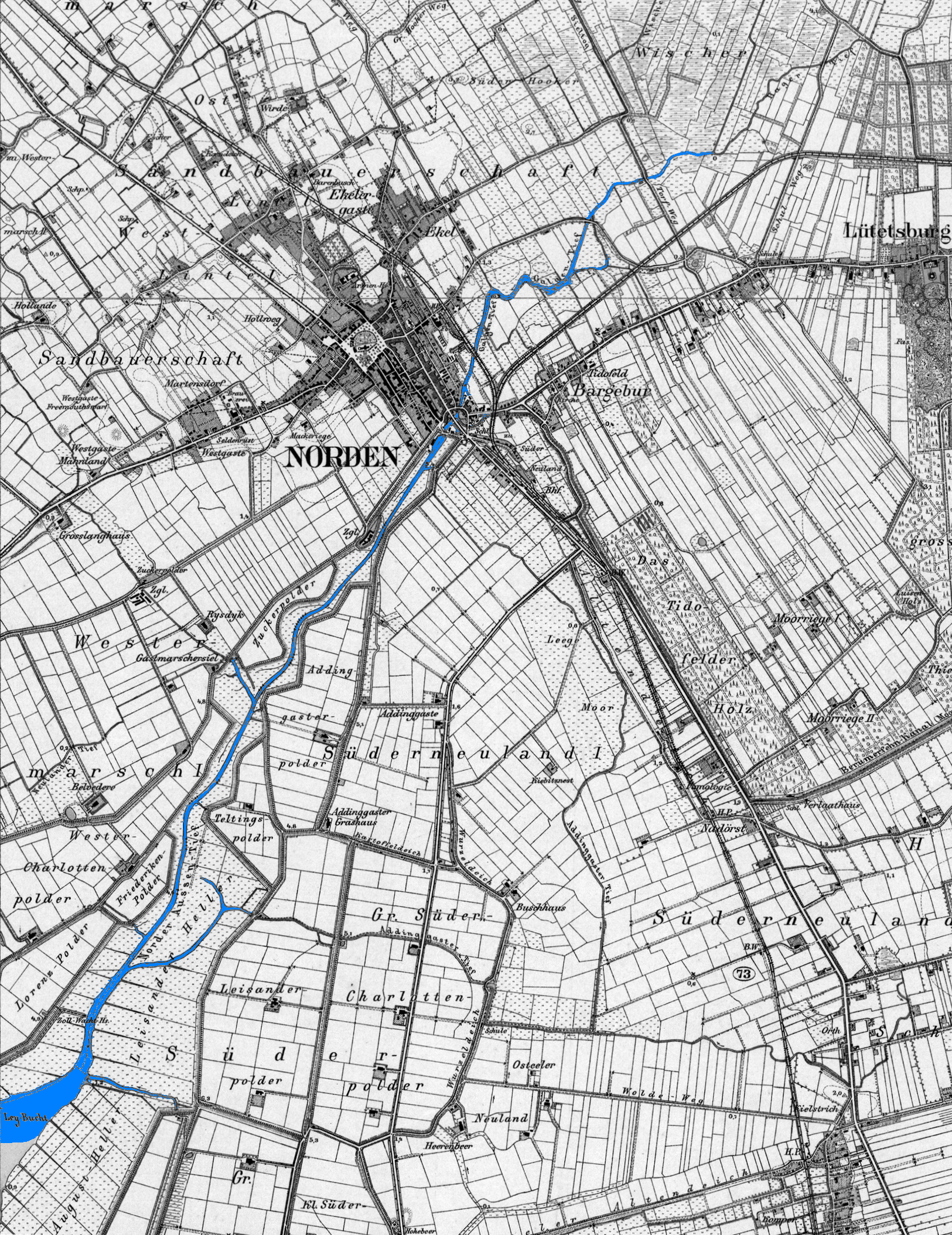 Norder Tief: Zusammenschnitt aus den Messtischblättern 1:25.000 Nr. 2309 Hage von 1891 und Nr. 2409 Norden von 1906, selber nachkoloriert